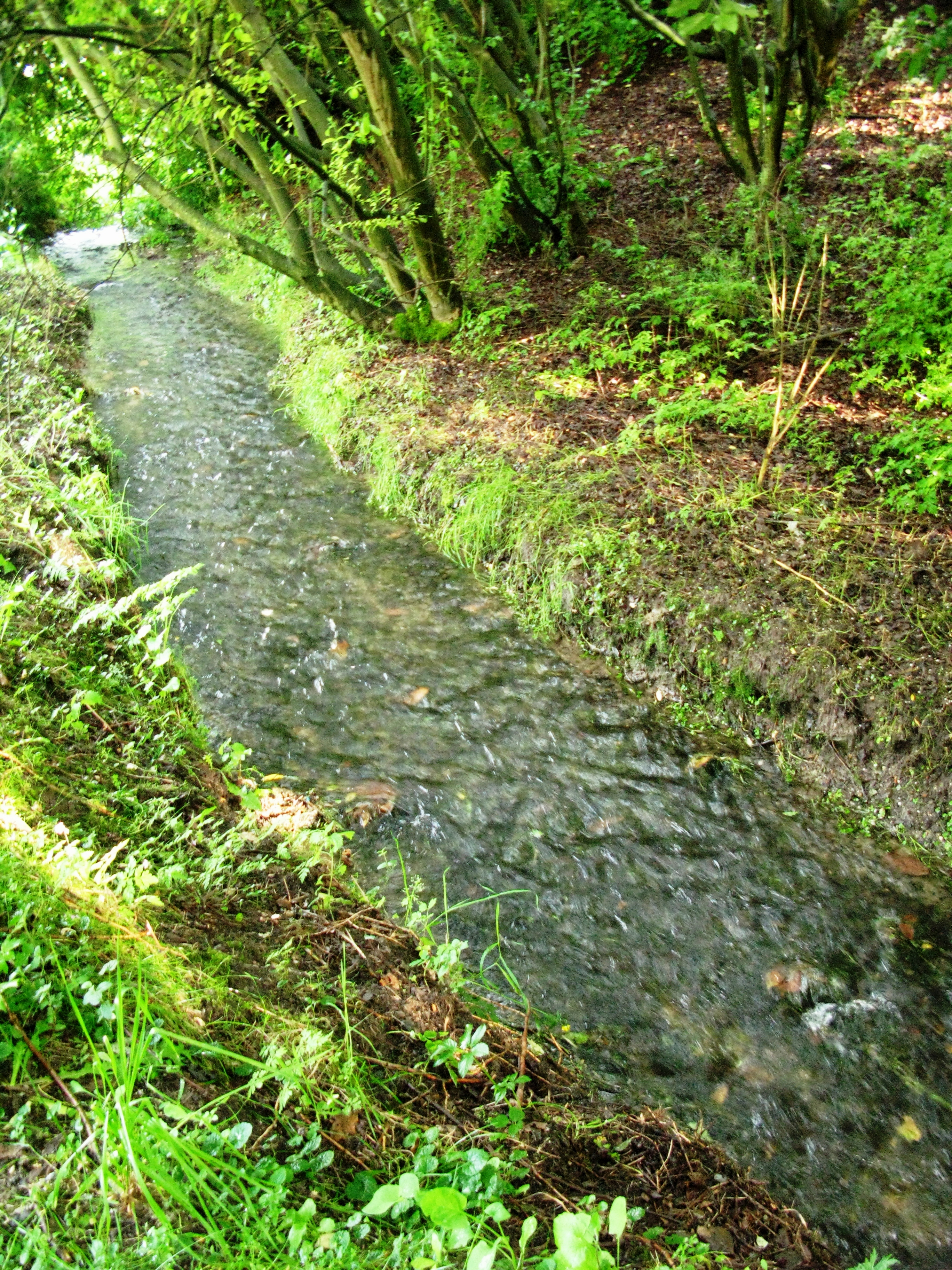 Le ruisseau d'Évegnée le long de la rue d'Évegnée à Saive, environ 500 m avant la confuence avec la Julienne.